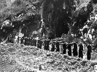 Dân công sắc tộc thiểu số chuyển hàng ra hỏa tuyến